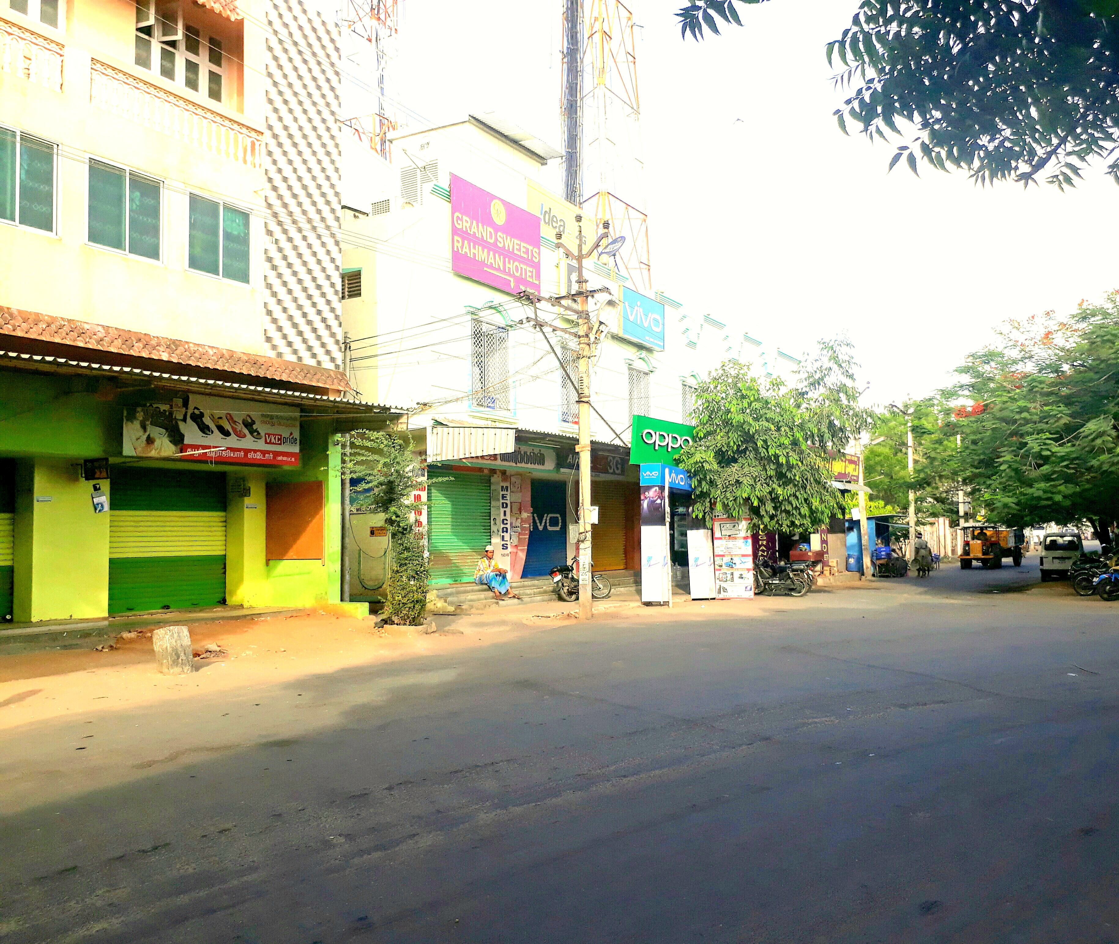 ஷாநகர் திண்டுக்கல் சாலை